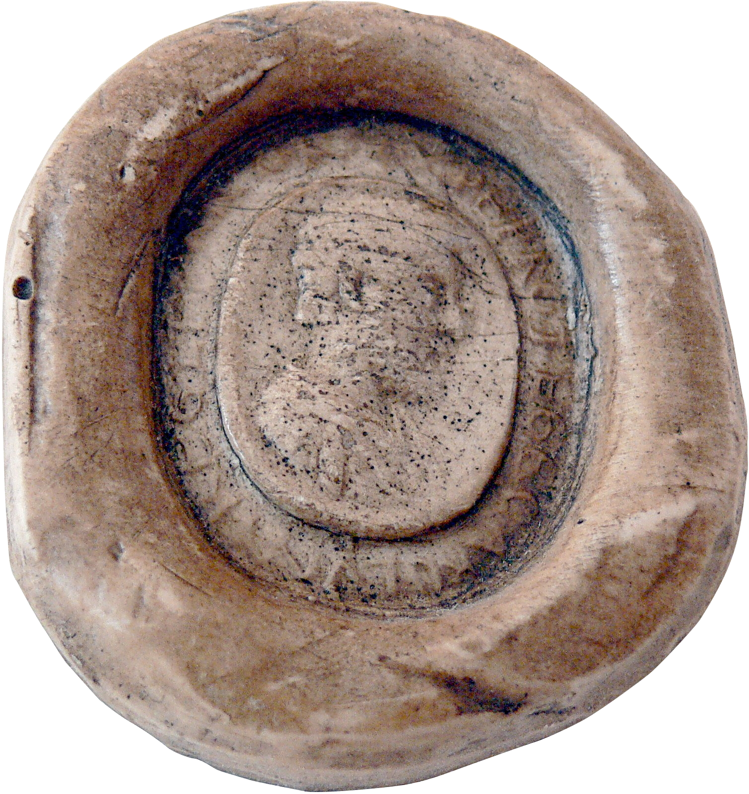 Siegel Karls des Großen als Frankenkönig 780.